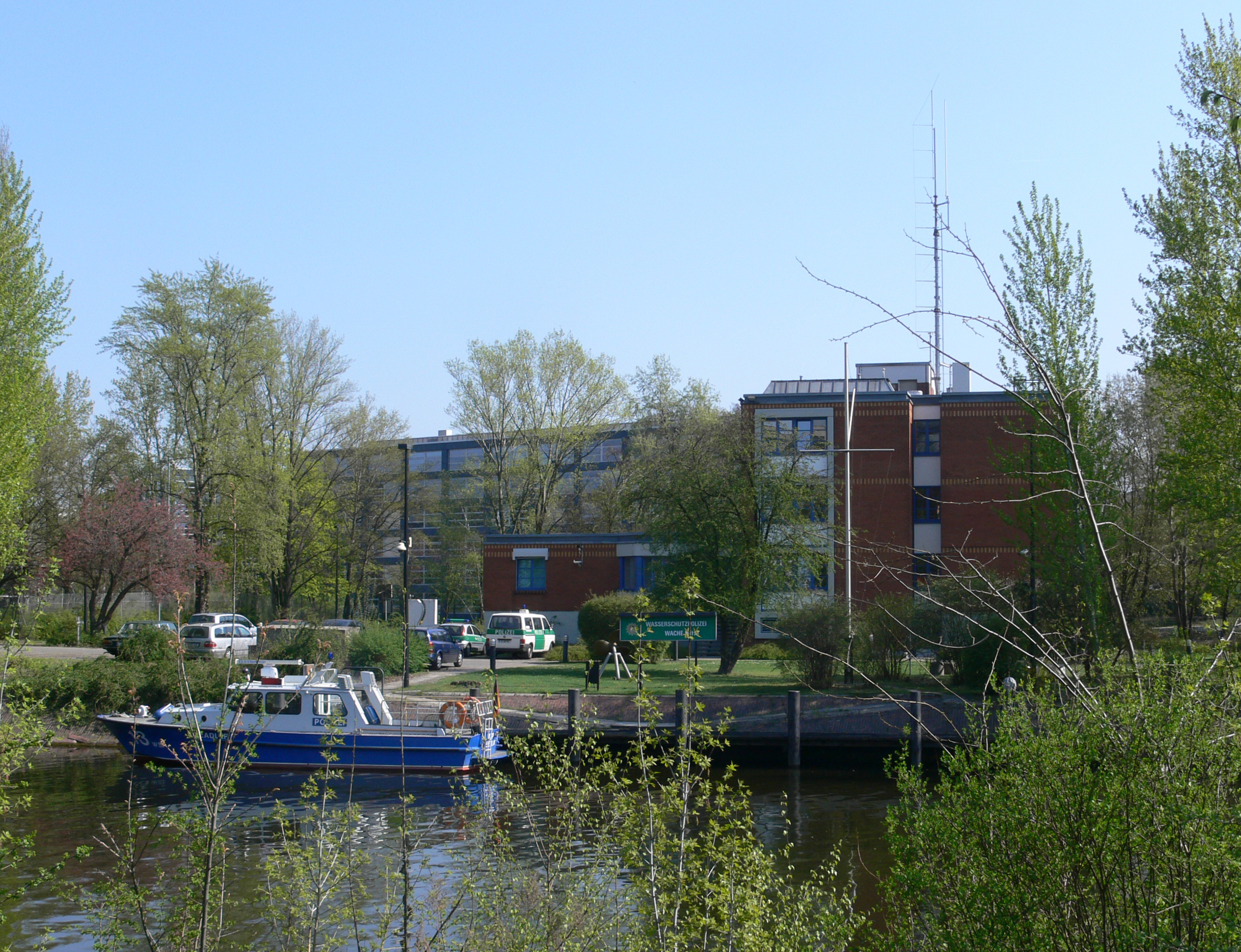 Berlin-Moabit, Wasserschutzpolizei, Neues Ufer (am Charlottenburger Verbindunskanal), gesehen vom Charlottenburger Goslarer Ufer